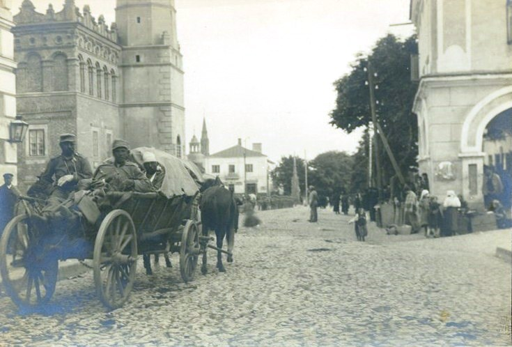 Снимка от транспортирането на ранени австро-унгарски войници по улица в град Сандомиерц, Полша.